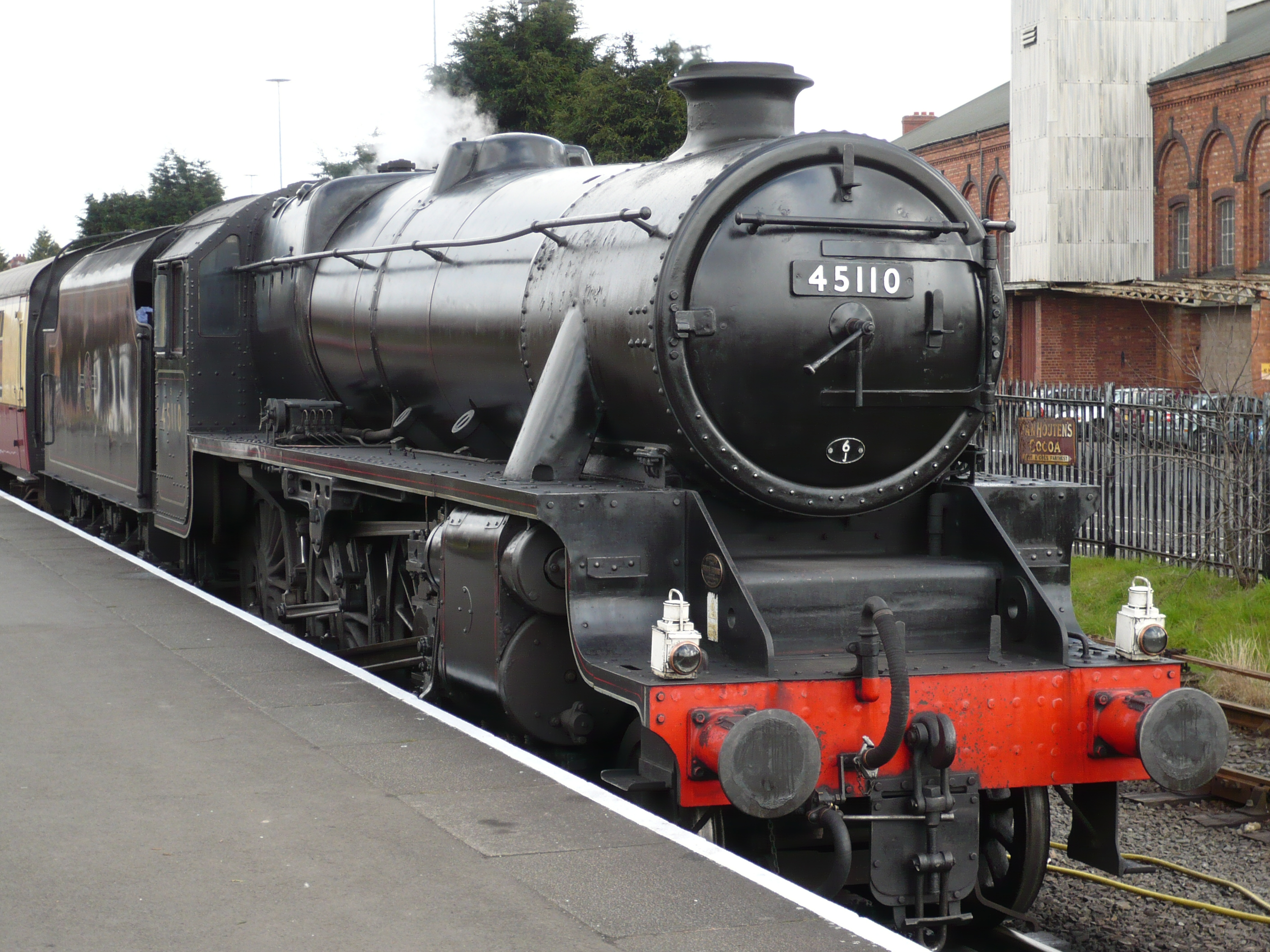 LMS Stanier Class 5 4-6-0 5110 at Kidderminster